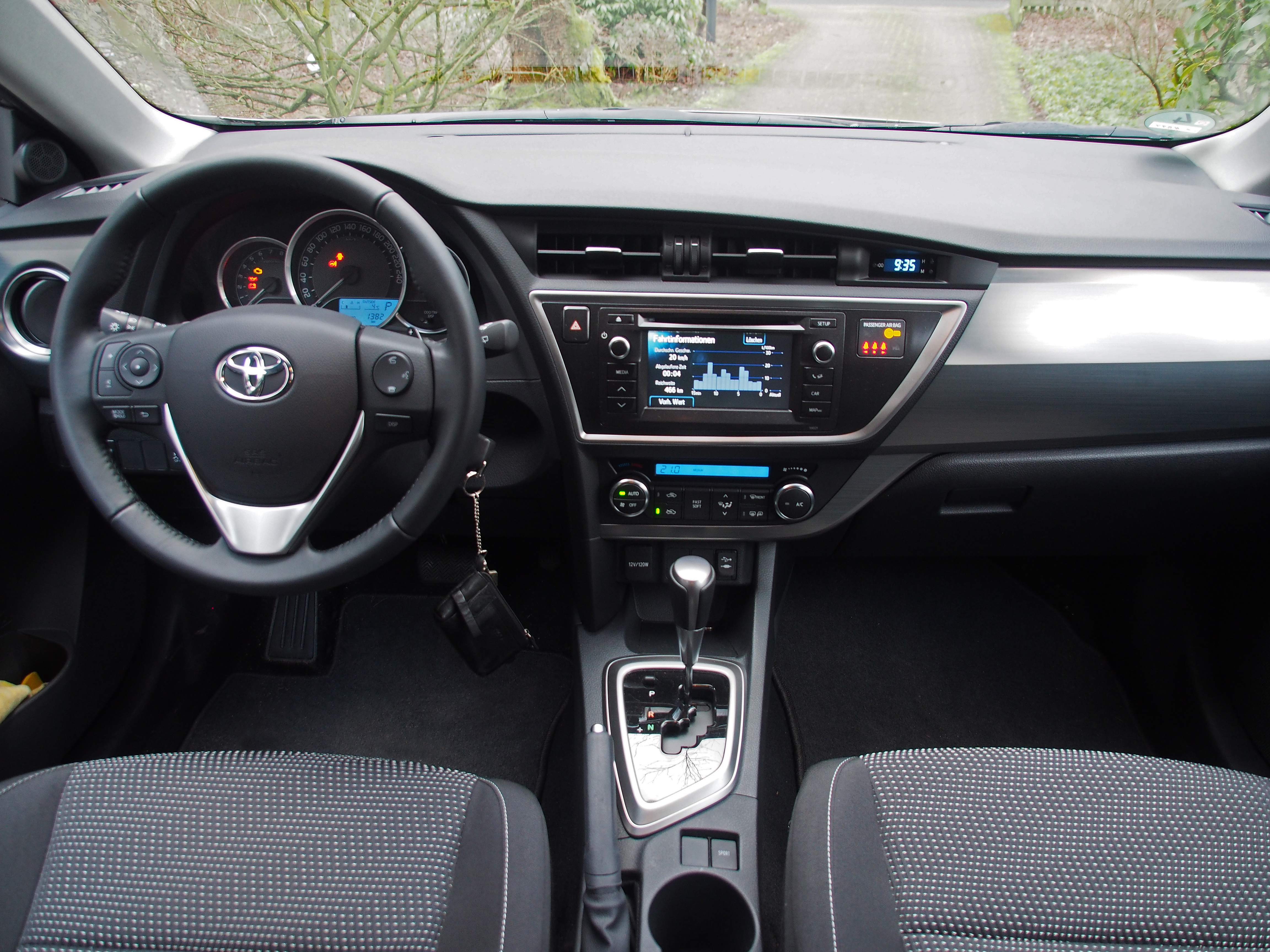 Cockpit Toyota Auris (E180) 1.6 Life+, Multidrive S